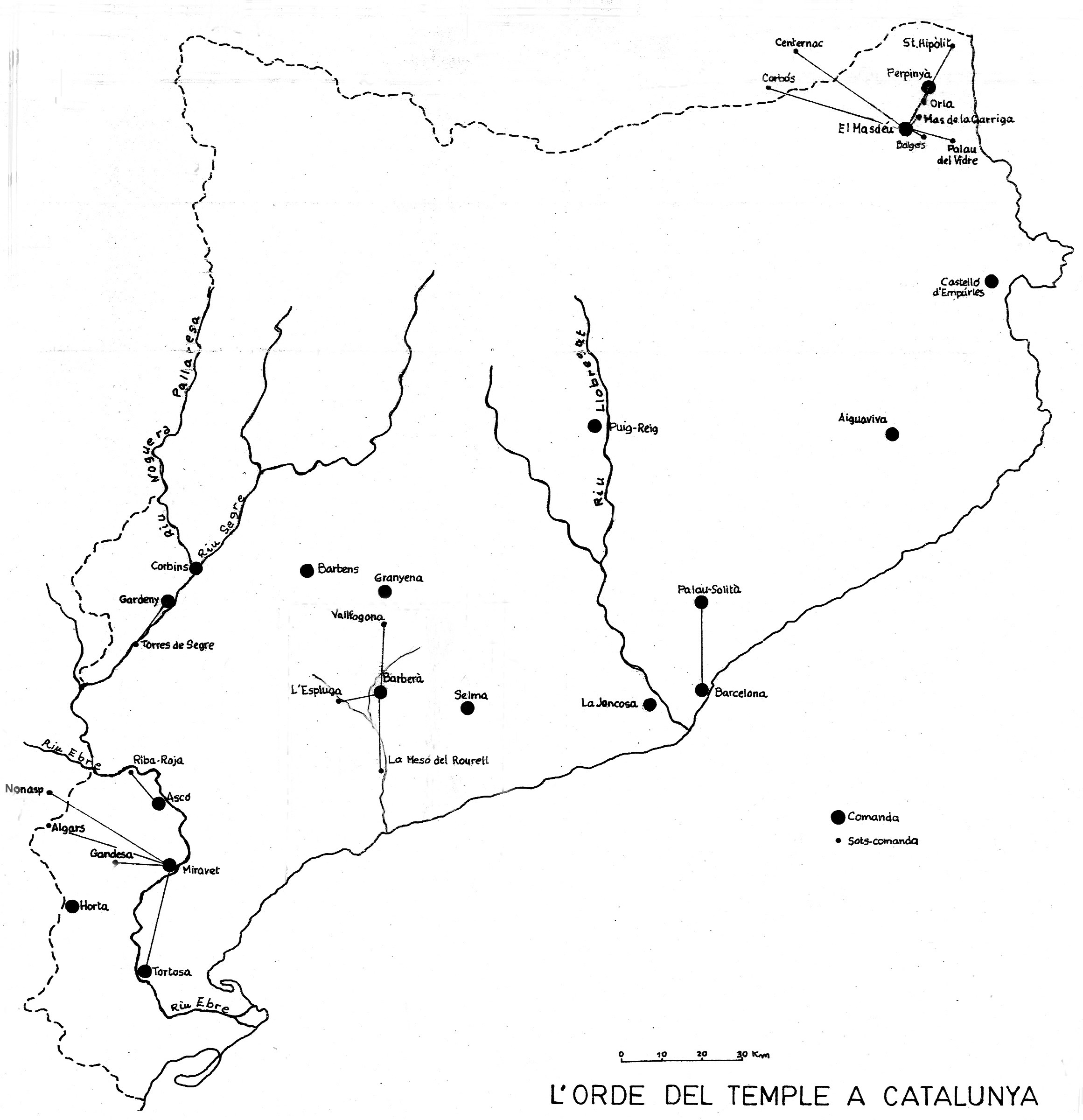 Les comandes de l'orde del Temple a Catalunya (Dib. J. Fuguet, 1989)